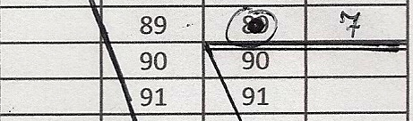 Ostatni rzut drużyny